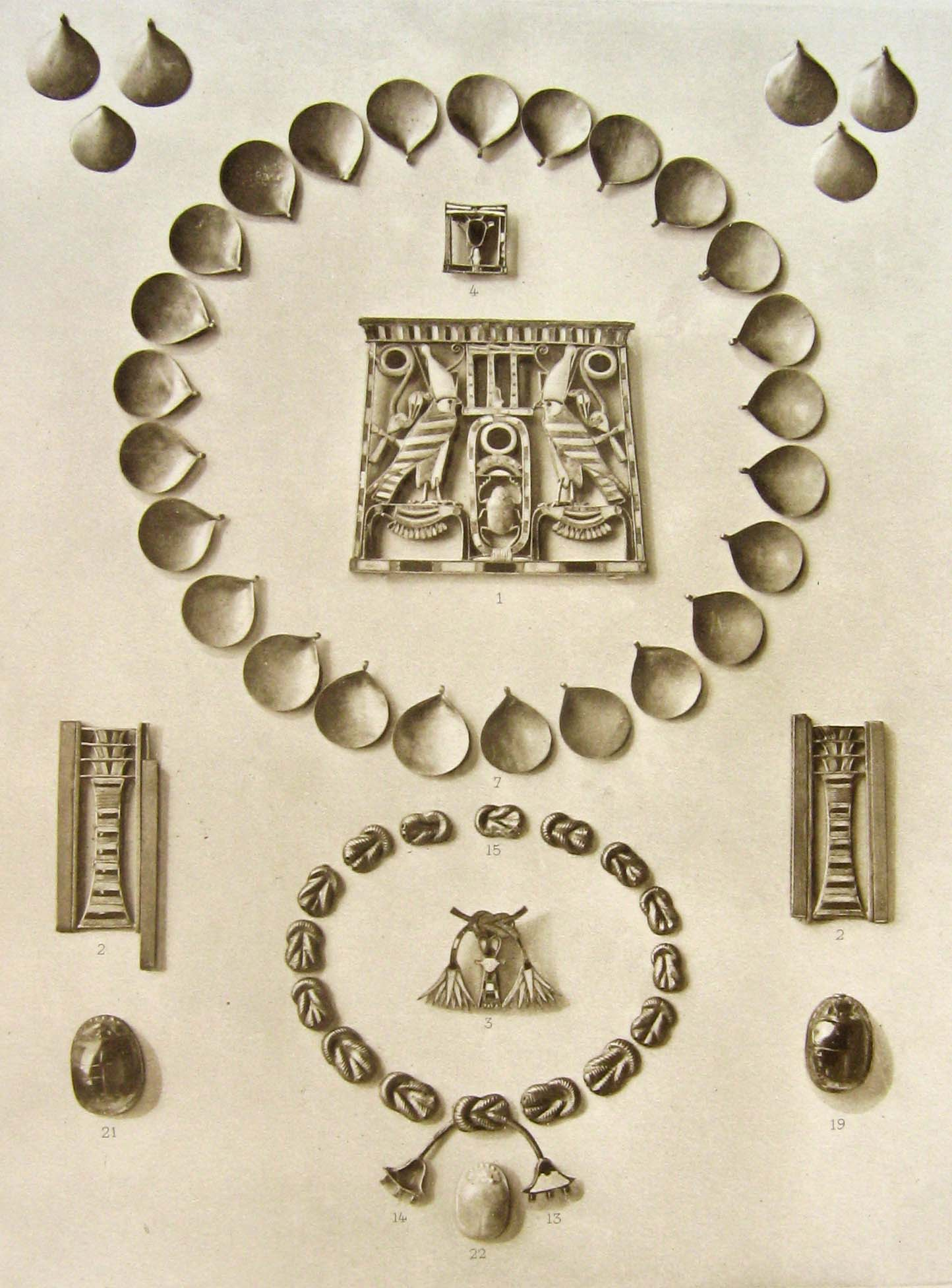 bijoux du trésor du complexe de Sésostris III à Dahchour